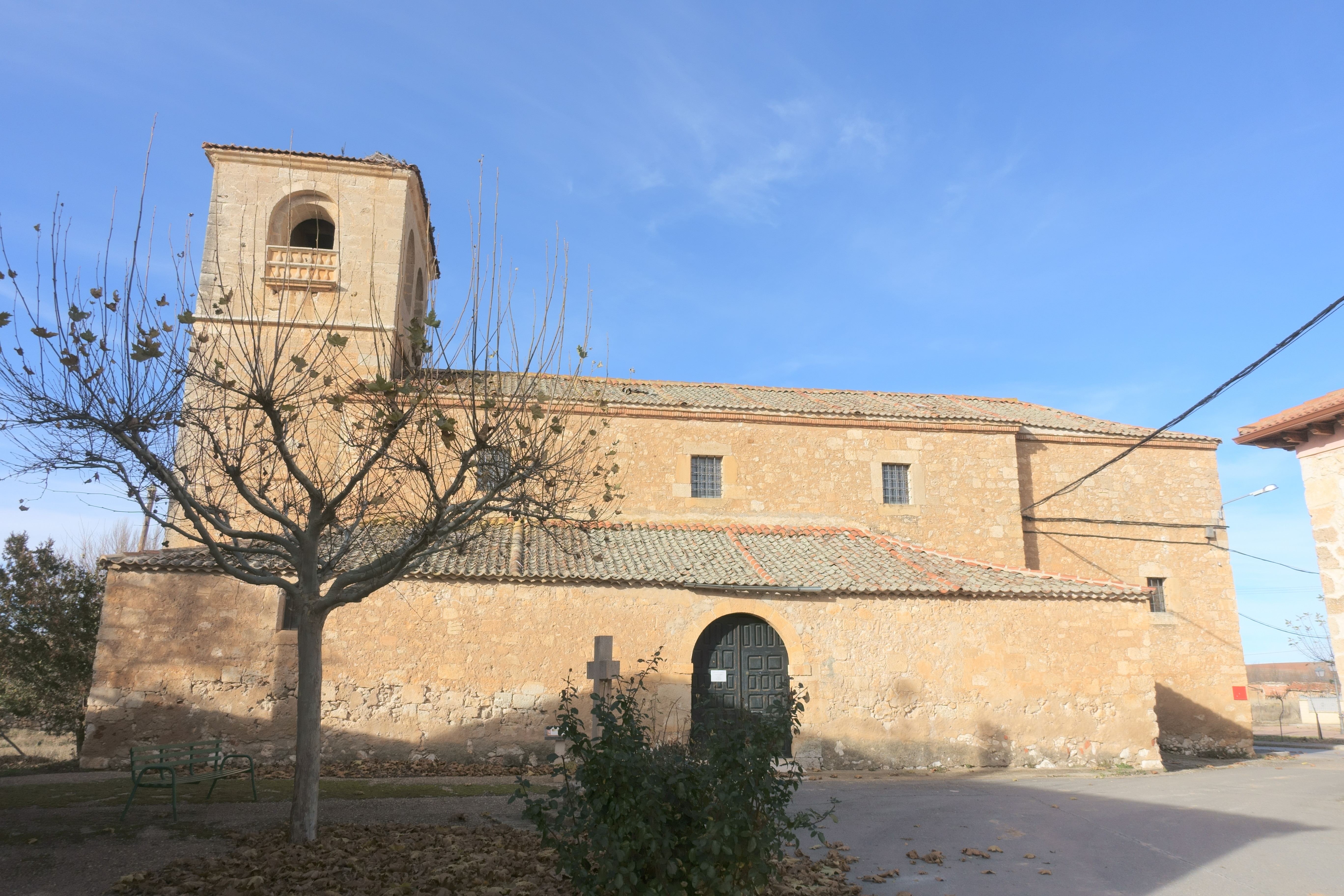 Iglesia de San Bartolomé, Riaguas de San Bartolomé (Segovia, España).